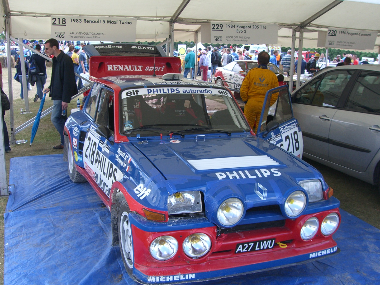 1985 Renault 5 Maxi Turbo